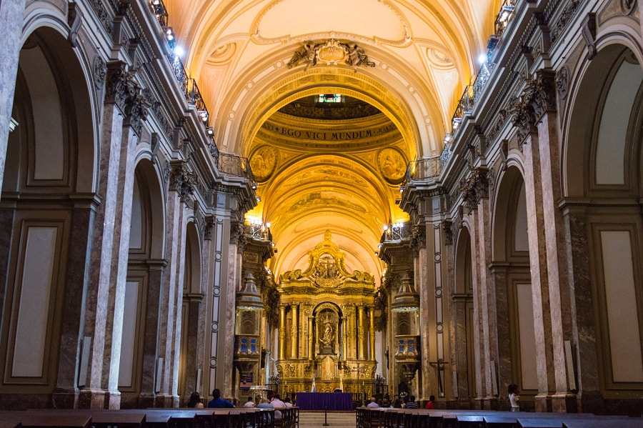 Кафедральный собор Буэнос-Айреса